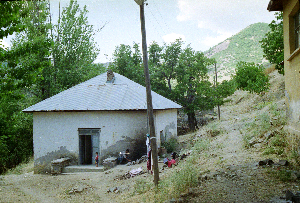 Taşıtlı Köyü'nün eski İlkokulu